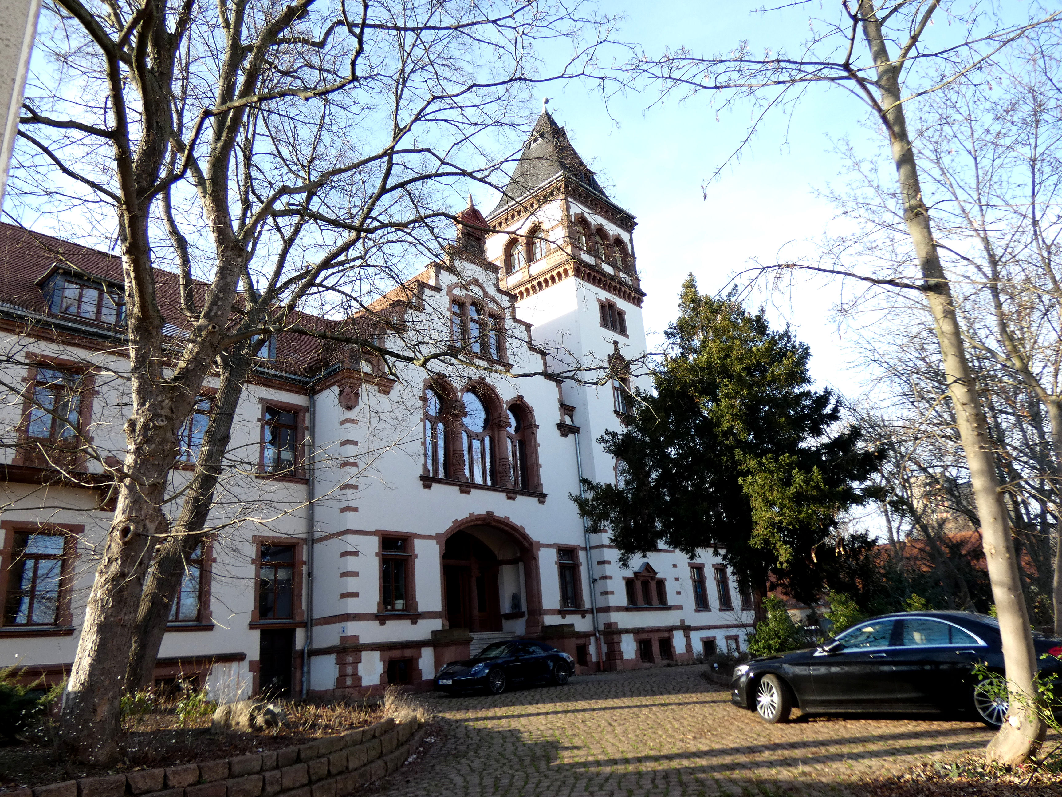 Südliche Neustadt,Passendorfer Gut, Passendorfer Schlösschen, Teichstraße, Halle (Saale)